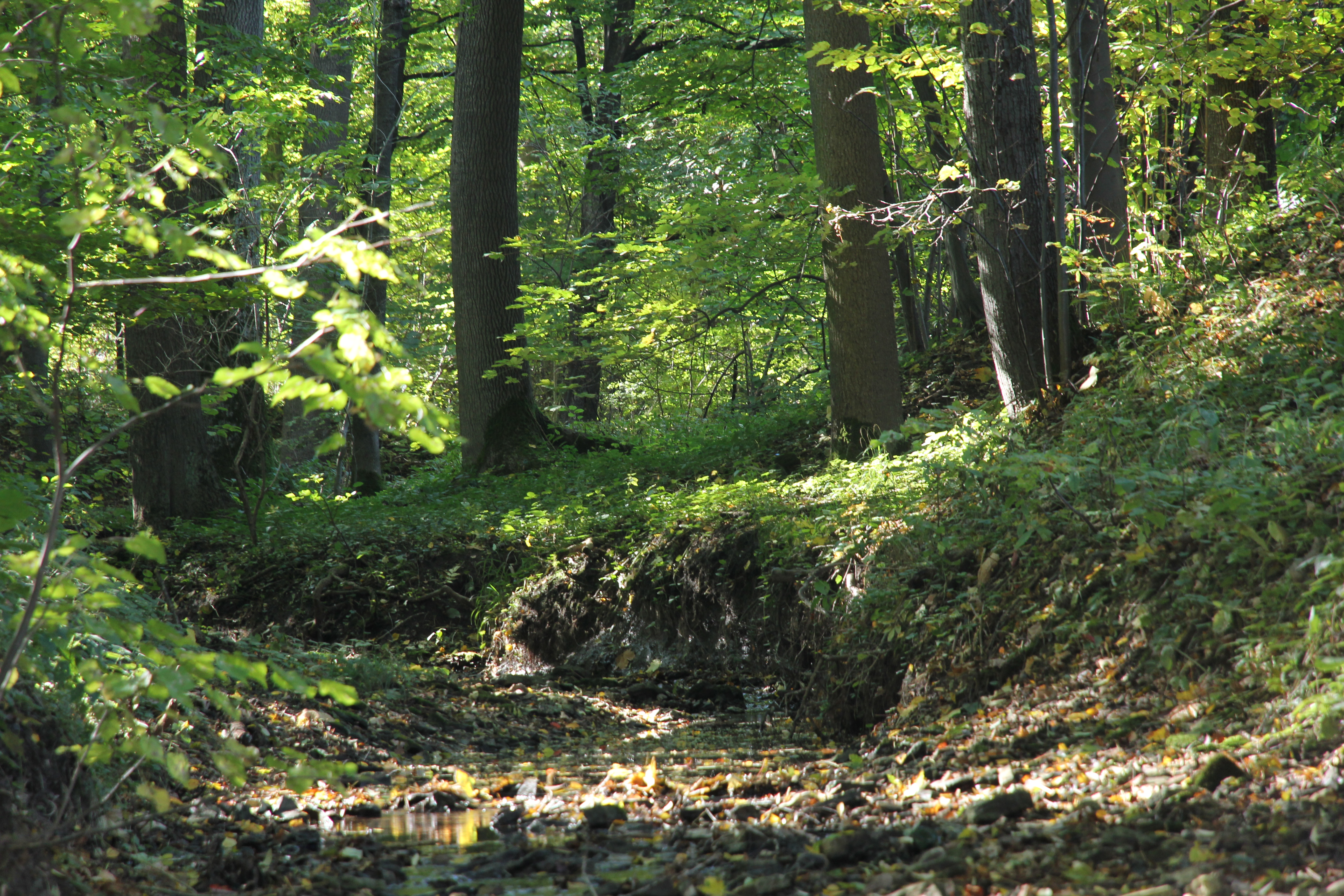 šadovsky potok v D.Zukově